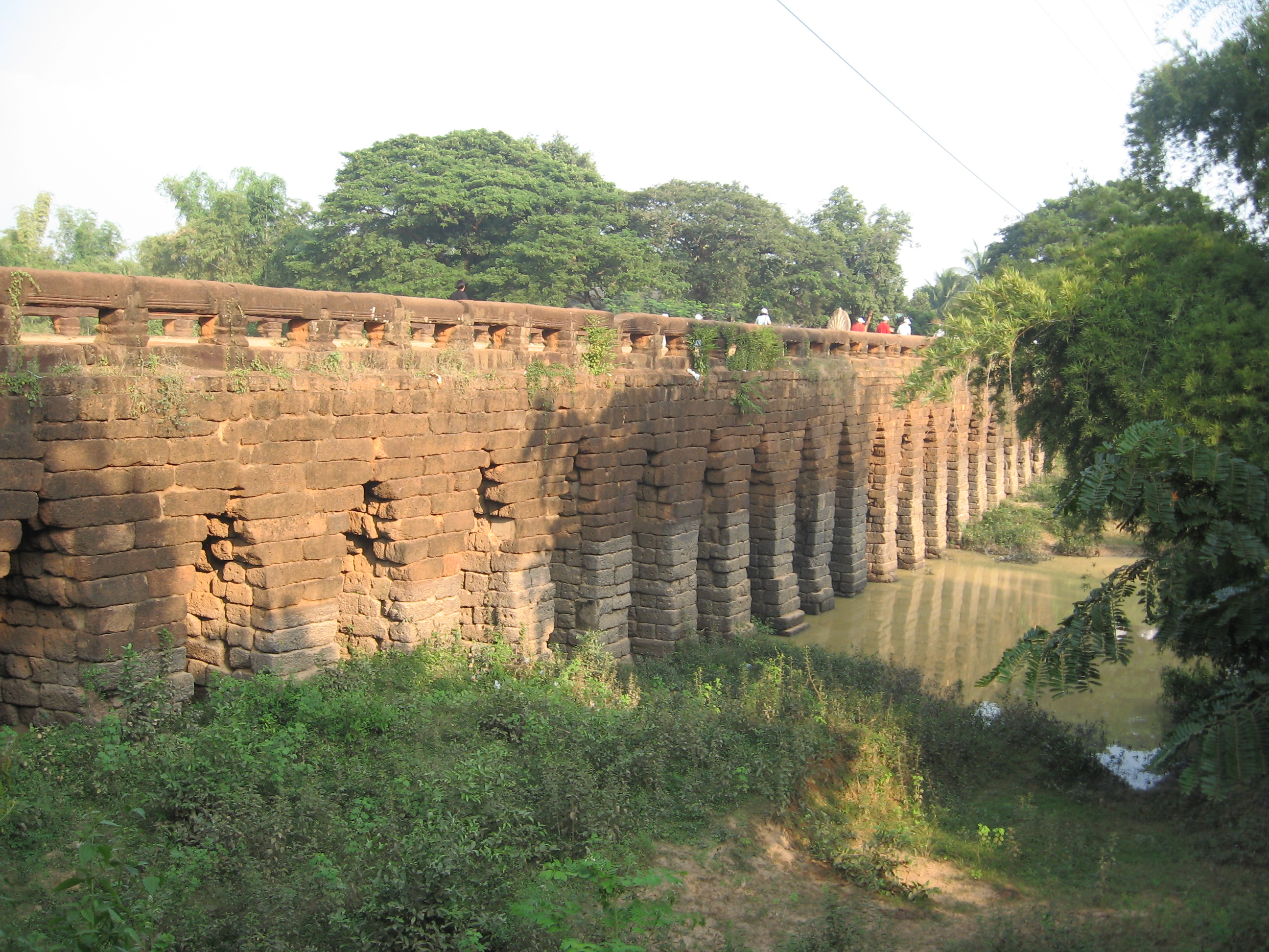 Cầu gỗ Kampong Kadai - Phan Minh Châu chụp tại Siêm Riệp